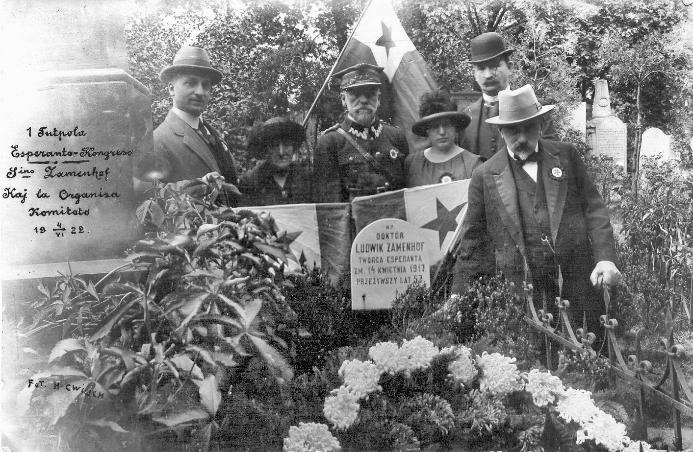 Organiza komitato de la 1a Tutpollanda Esperanto-Kongreso, Varsovio 1922. De maldekstre: Eduardo Wiesenfeld, Klara Zamenhof, Odo Bujwid, P. Muszkatblatt, Stanisław Essigmann, Leo Belmont.